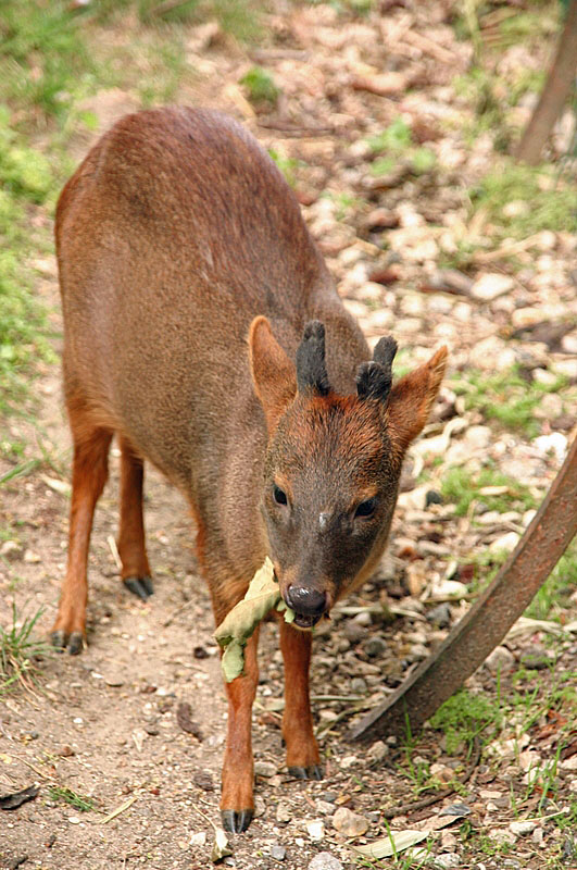 Photo d'un poudou au Jardin des Plantes à Paris